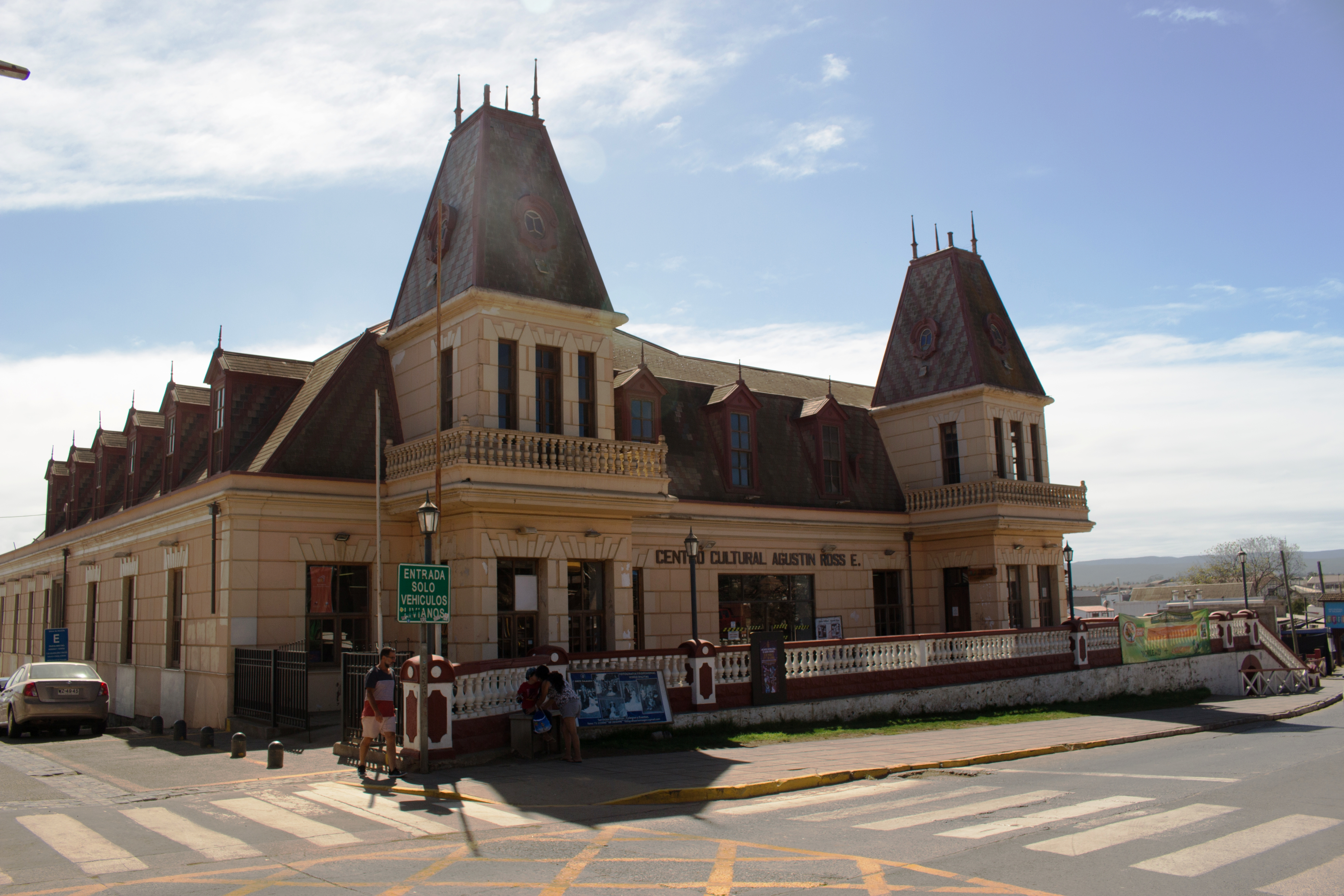 Antiguo Casino Pichilemu, actualmente Centro Cultural Agustín Ross, comuna de Pichilemu.